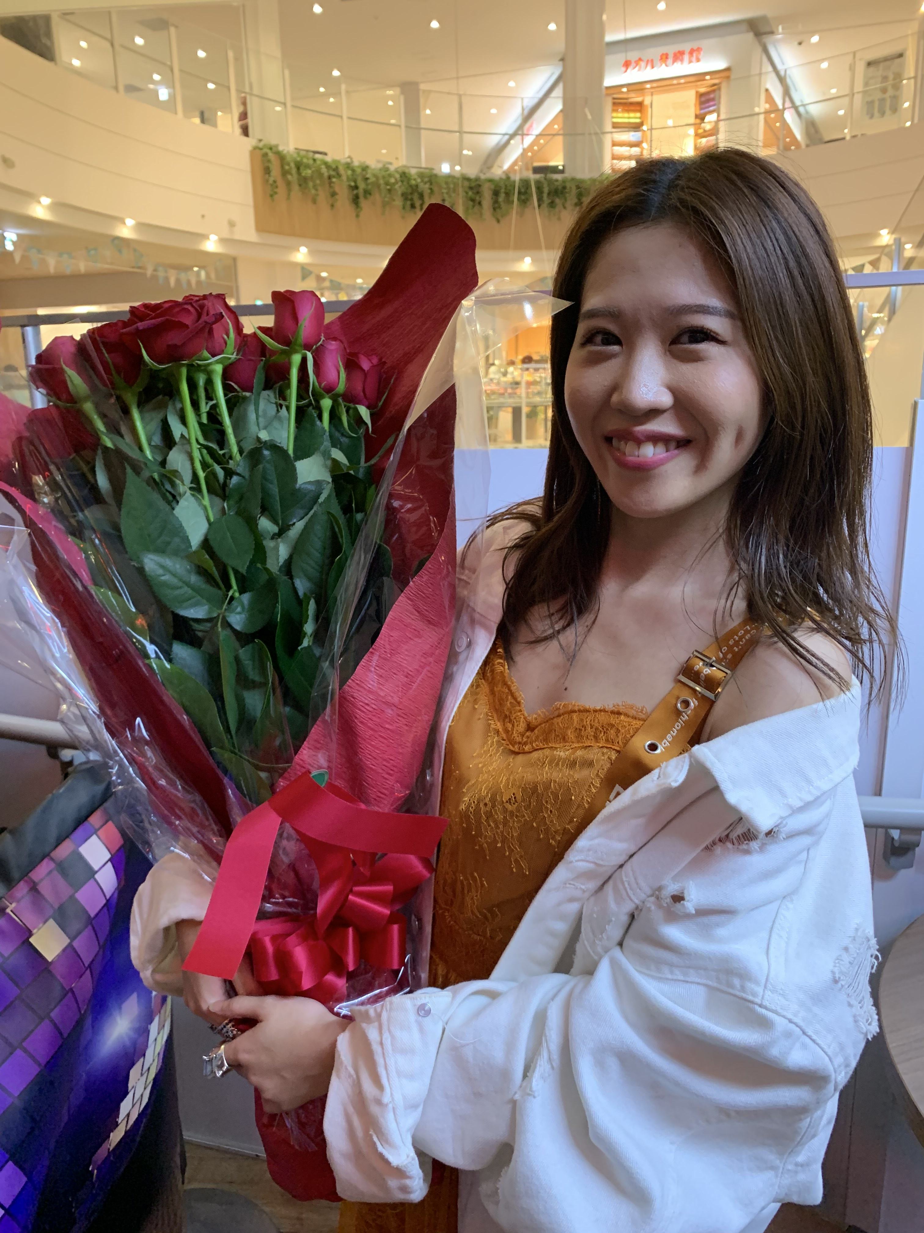 2019.7.24海老名ララポ－トにて、prime time エビ－バディスコ